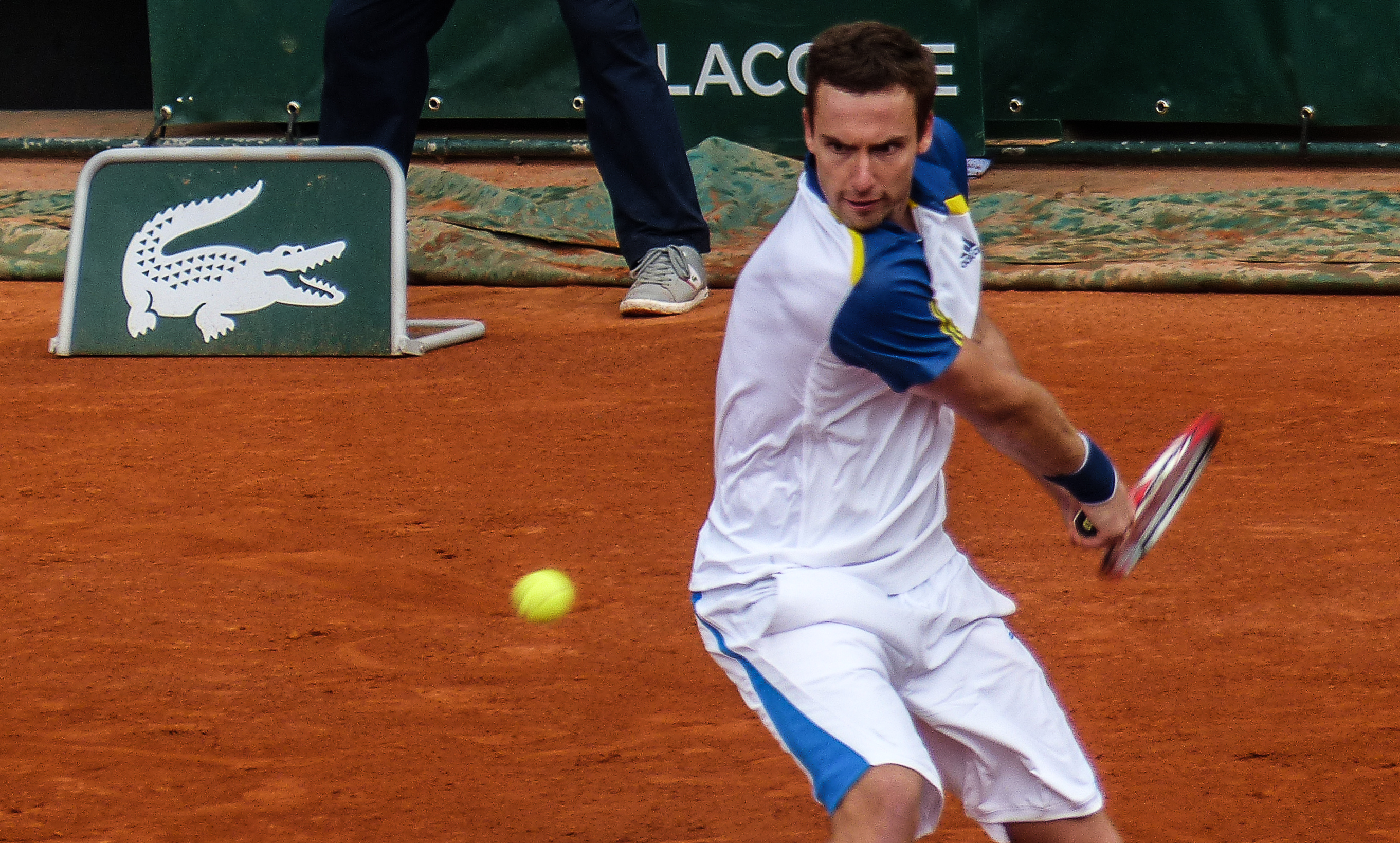 2ème tour Roland Garros 2013 : Gael Monfils (FRA) def. Ernests Gulbis (LAT)